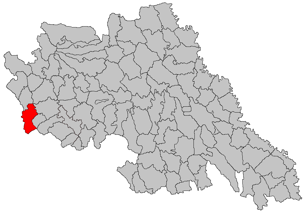 Categorie:Hărţi ale judeţului Iaşi